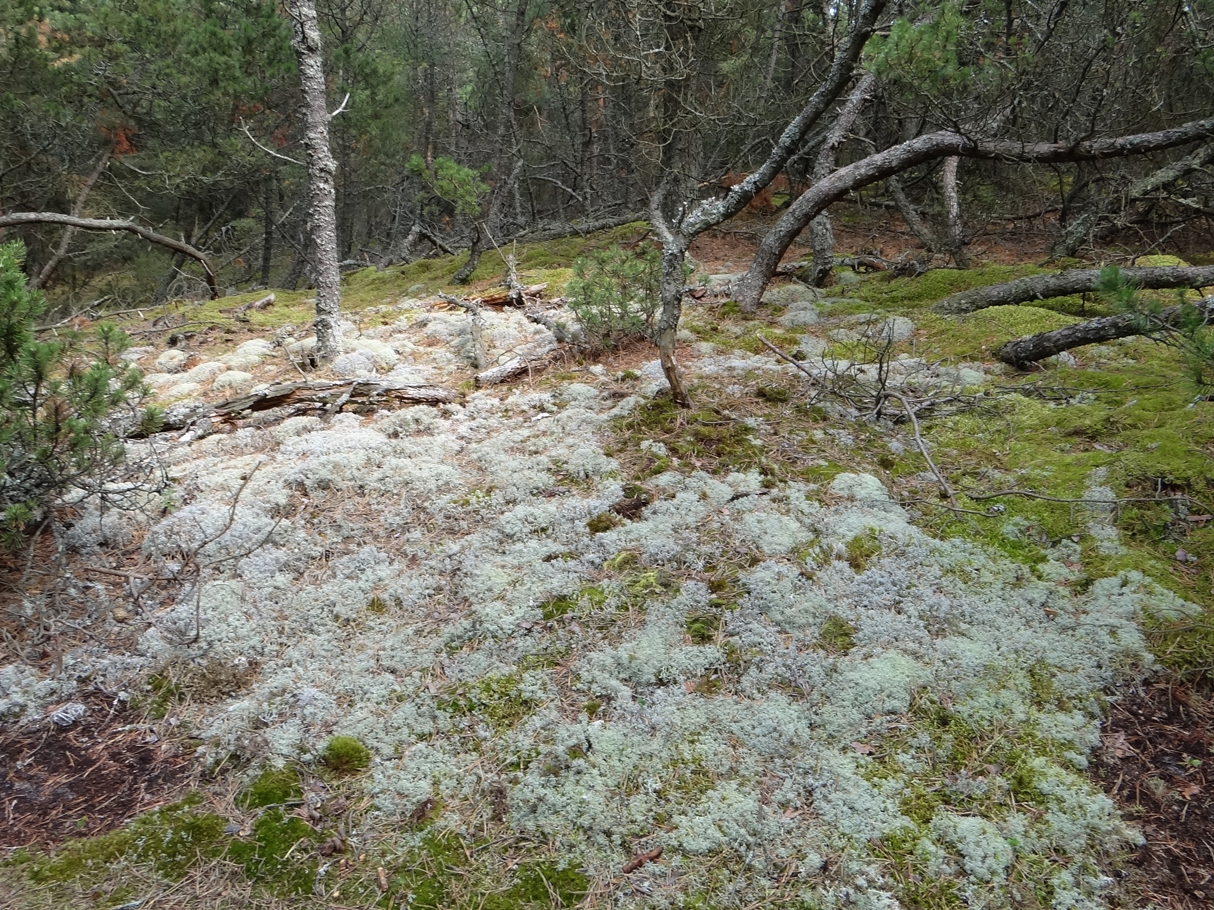 Cladonio-Pinetum (location: Poland, Hel)